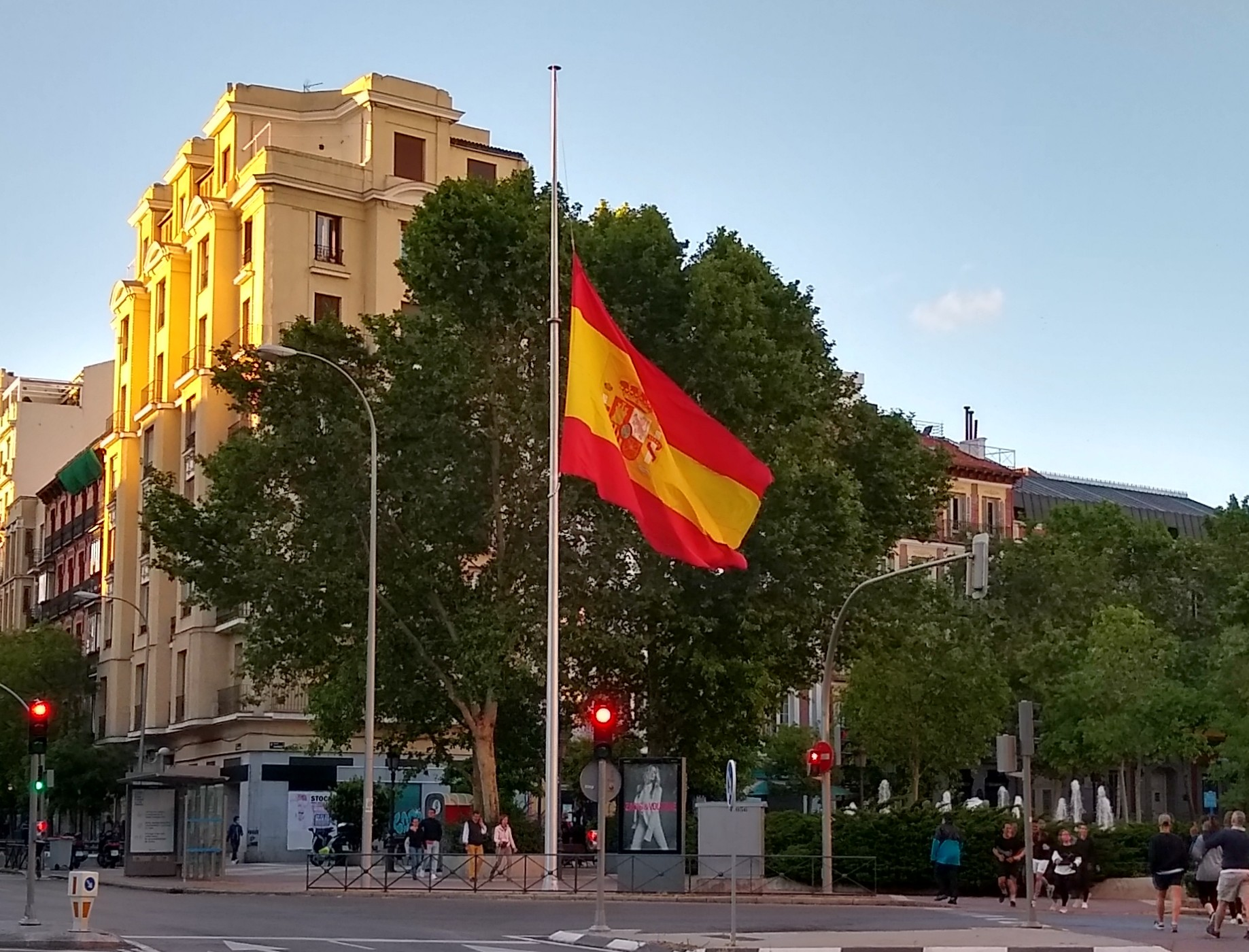 En Madrid salvamos vidas arriando las banderas. Plaza de Chamberí.